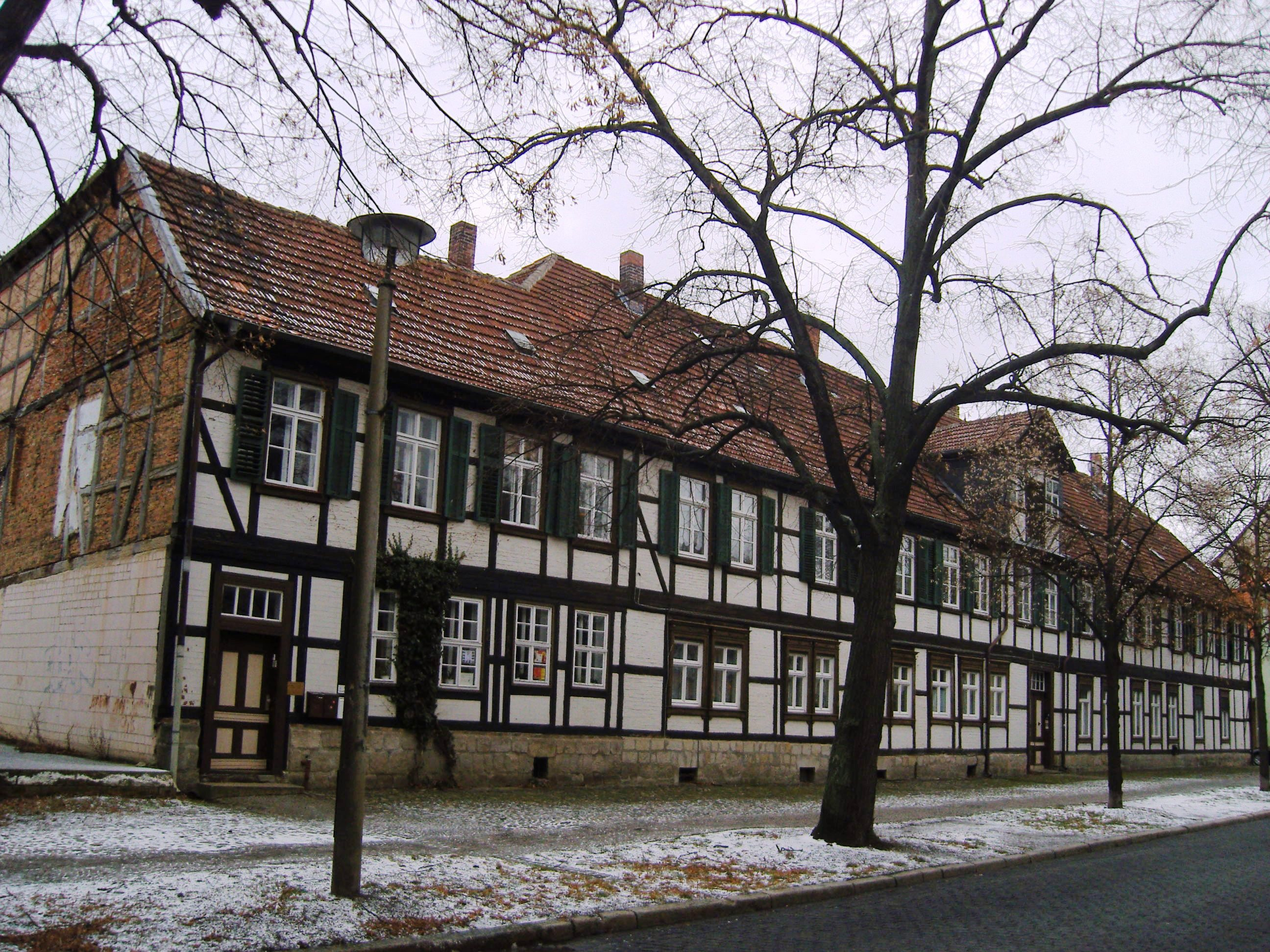 Denkmalgeschützte Manufaktur Weberstraße 42 in Quedlinburg